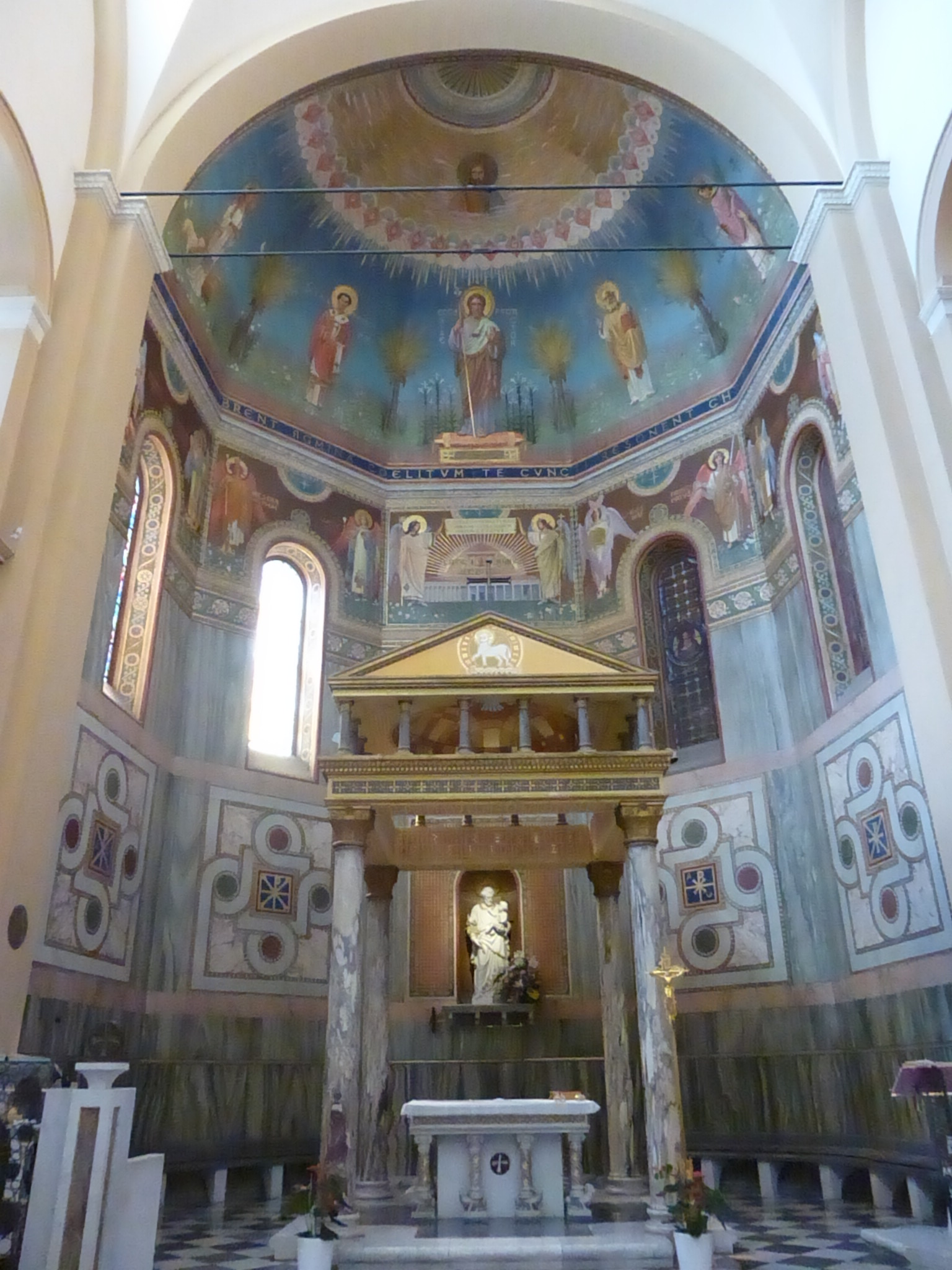 Roma, S. Giuseppe a via Nomentana, abside e ciborio